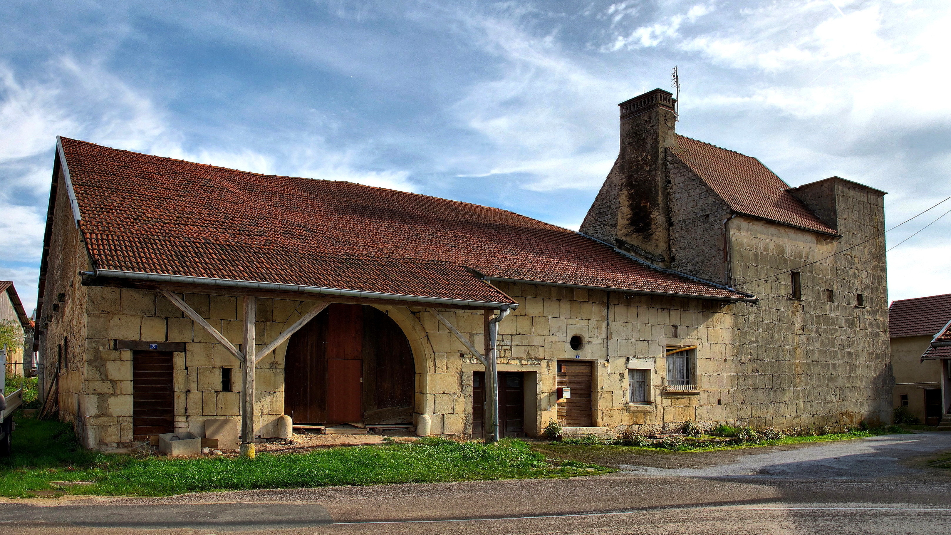 Inscrit aux monuments historiques sous le numéro PA25000002